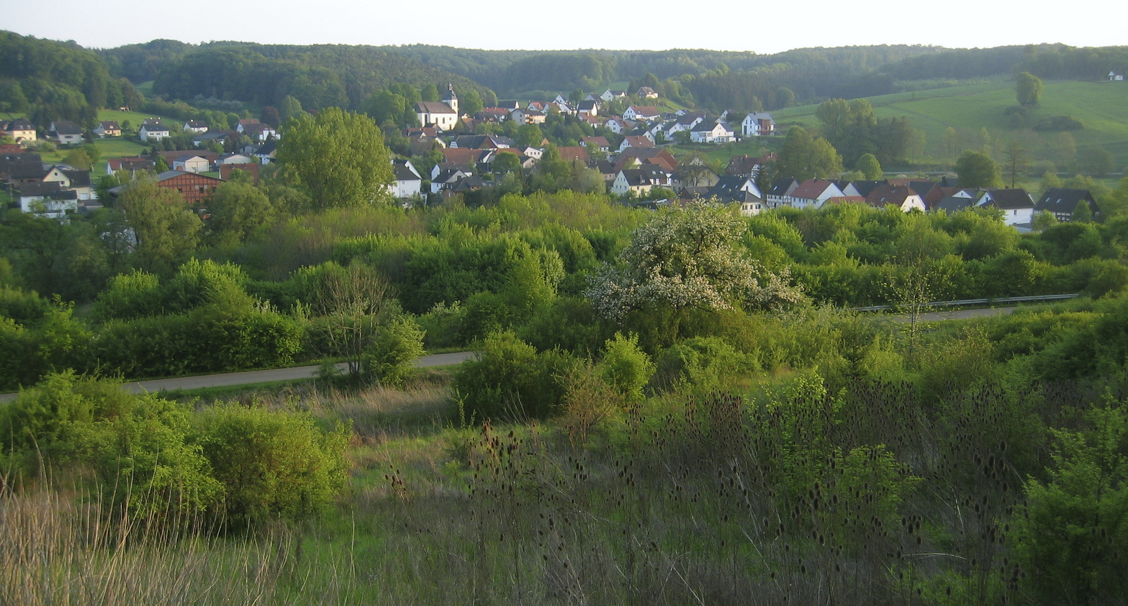 Blick vom Holzgarten aus (von Nordosten) auf den Ortskern von Istrup, Brakel, Nordrhein-Westfalen, Deutschland.